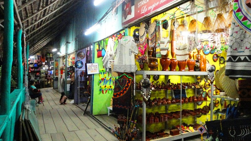 Tiendas de artesanía en el complejo artesanal Anaconda en Iquitos